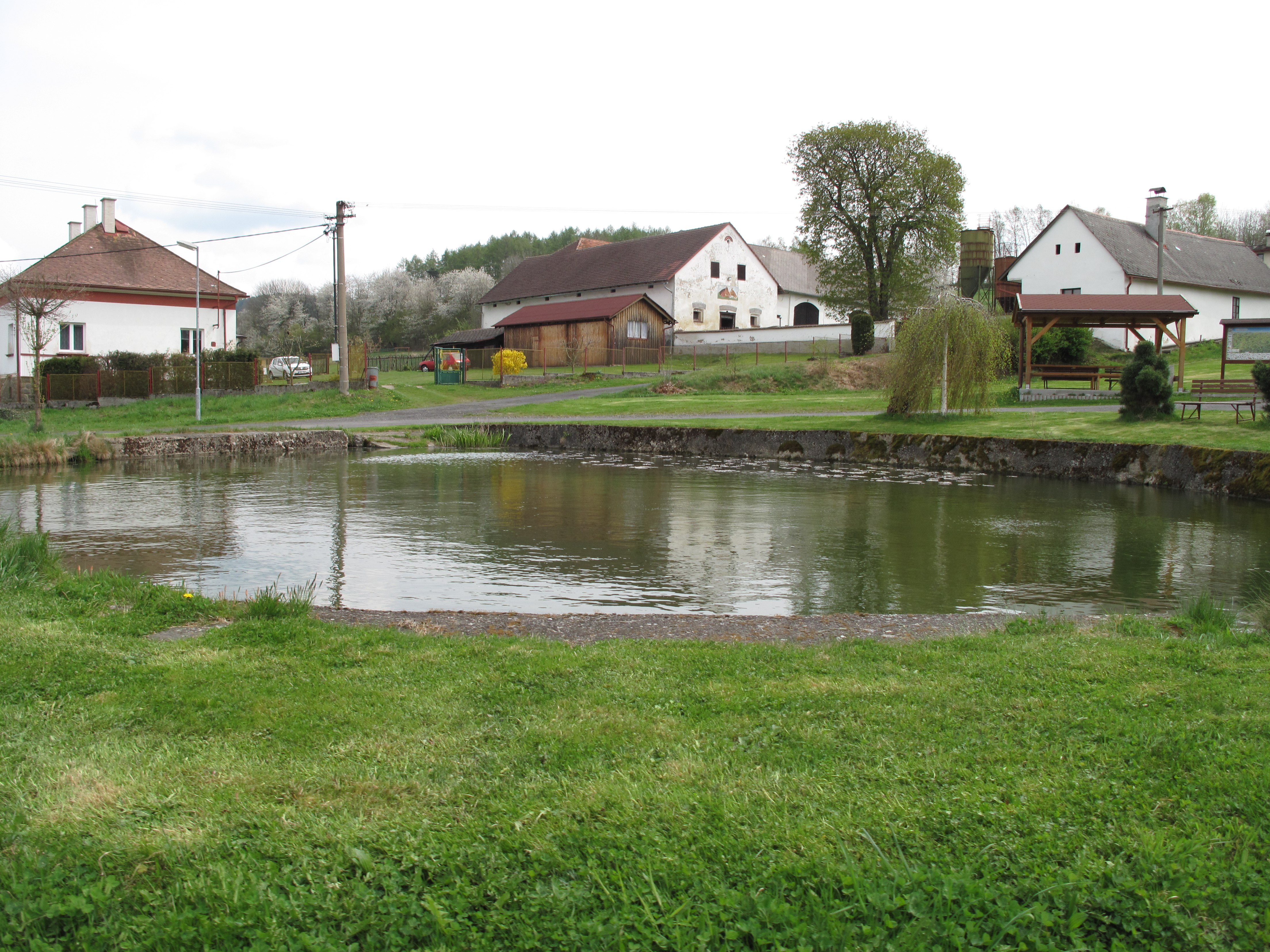 Javor (okres Klatovy). Okres Klatovy, Česká republika.